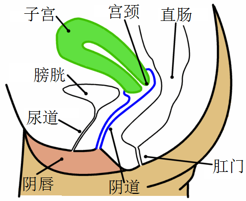 女性生殖器官解剖图，用于阴唇条目。带说明文字。作者为fabiform